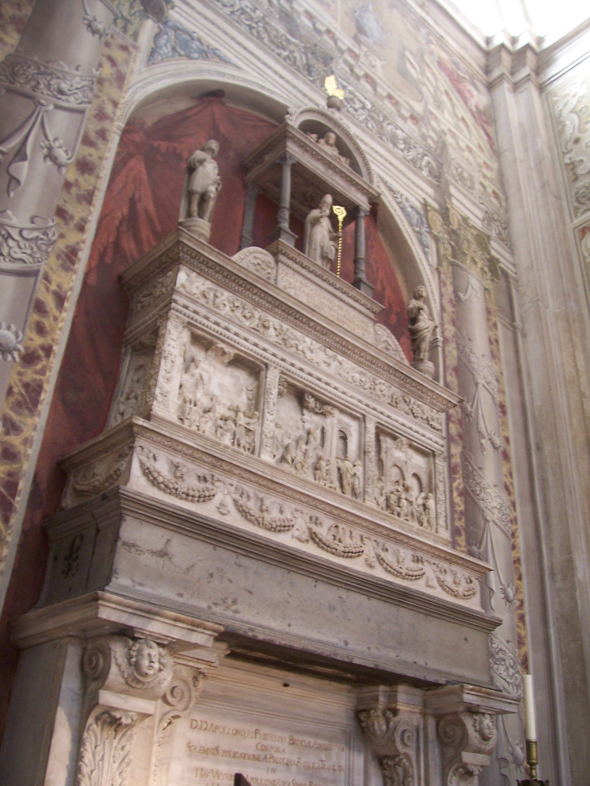 arca sant'apollonio duomo nuovo brescia.jpg